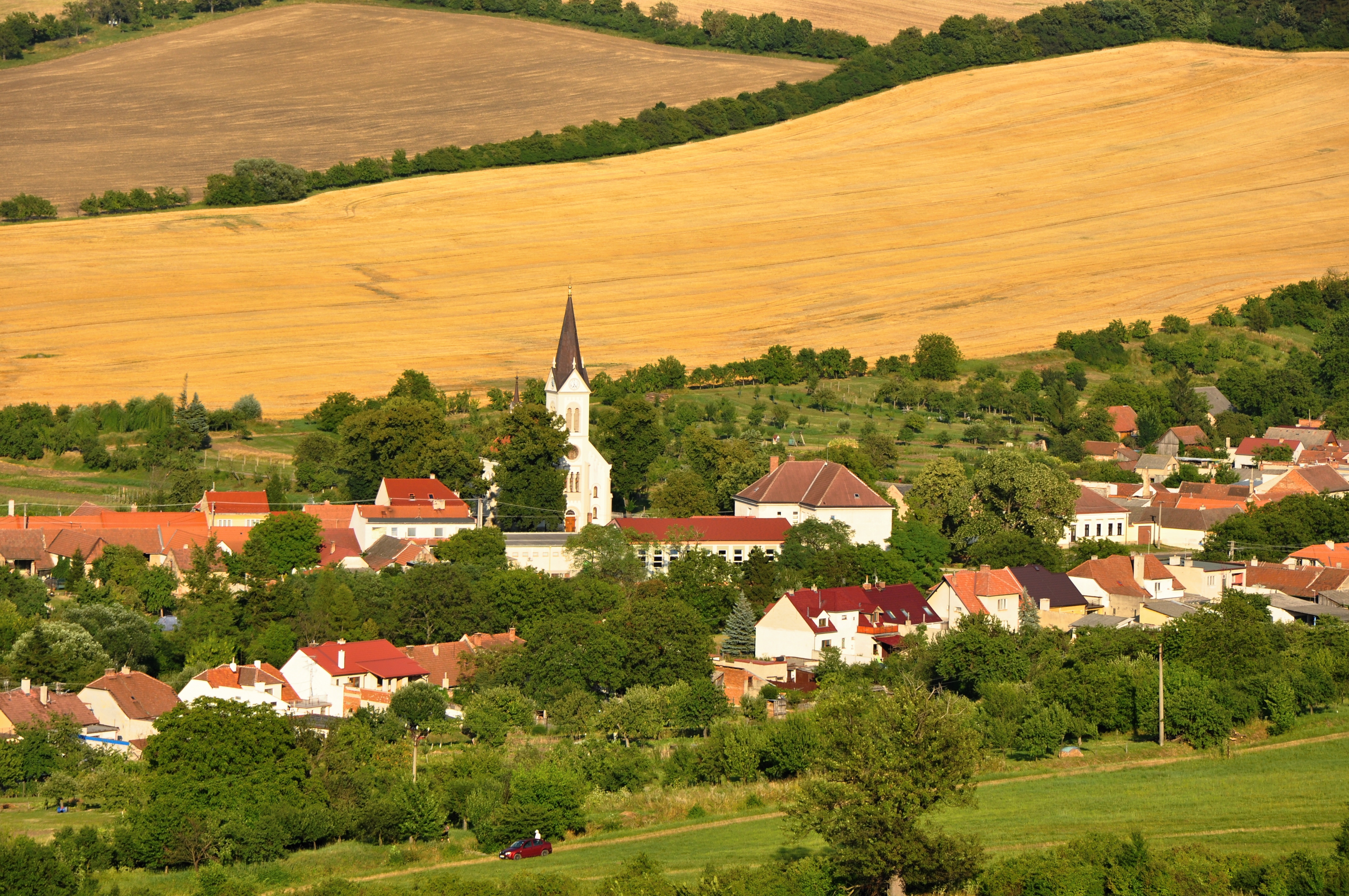 Pohled na Radějov